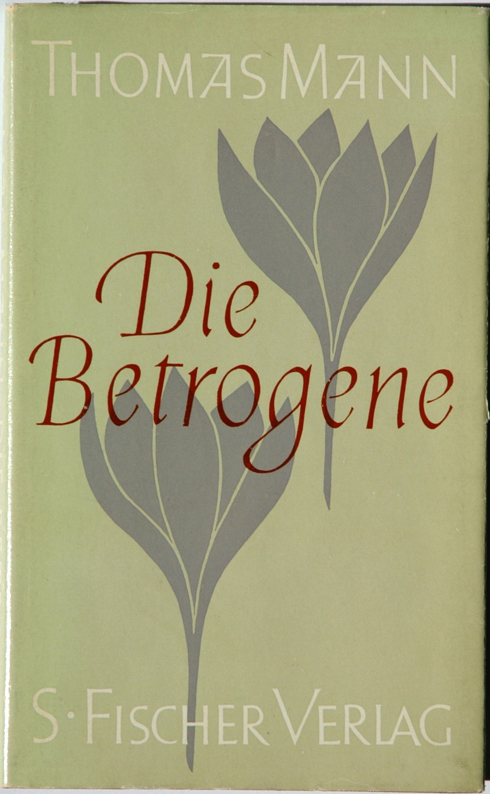 Thomas Mann: Die Betrogene. Erzählung. Frankfurt am Main: S. Fischer 1953, 127 Seiten. Erster Druck für den Handel (Potempa E 33.4, Bürgin I 95 A, Wilperrt/Gühring² 126). Orig.-Leinen 19 x 11,5, Orig.-Verlagsumschlag.